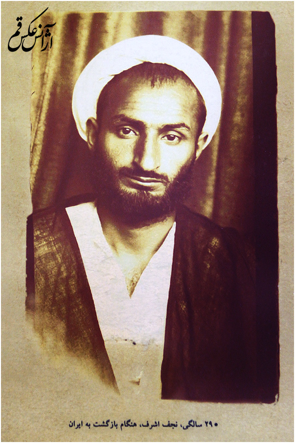 آیه الله محمد تقی بهجت فومنی - شهر نجف اشرف